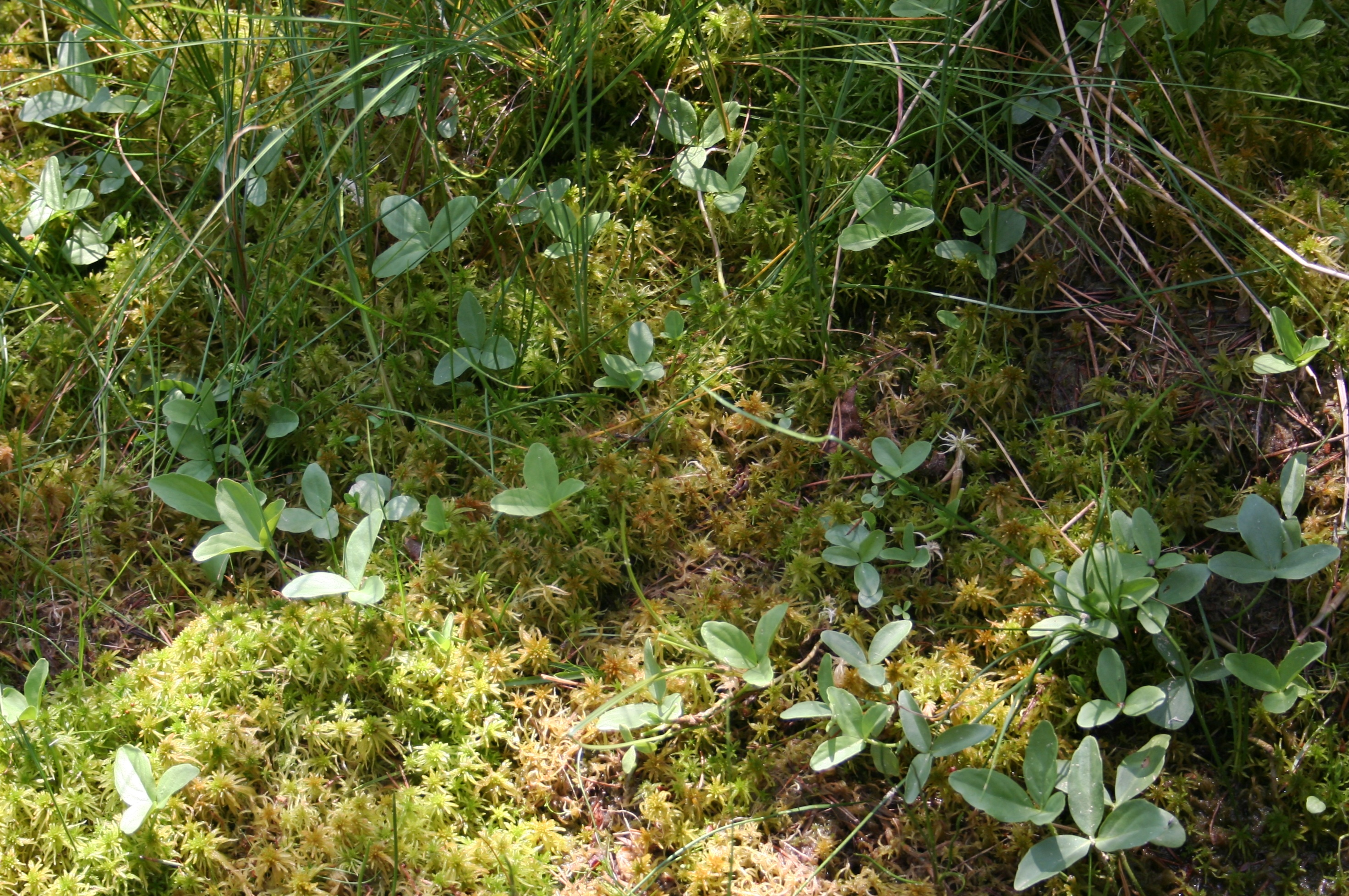 zbiorowisko z bobrkiem trójlistkowym w rezerwacie Dury, Wdecki Park Krajobrazowy